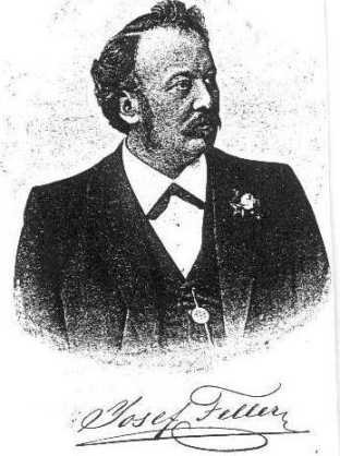 Josef Feller, Heimatdichter, Buchhändler, Verleger, geboren in Wörth a.d.Donau, gestorben in Chemnitz